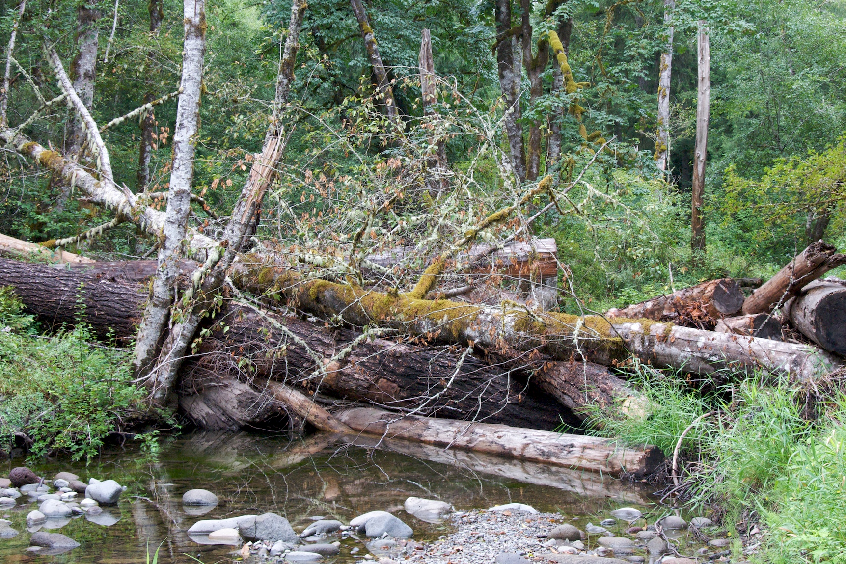 One season old logjam